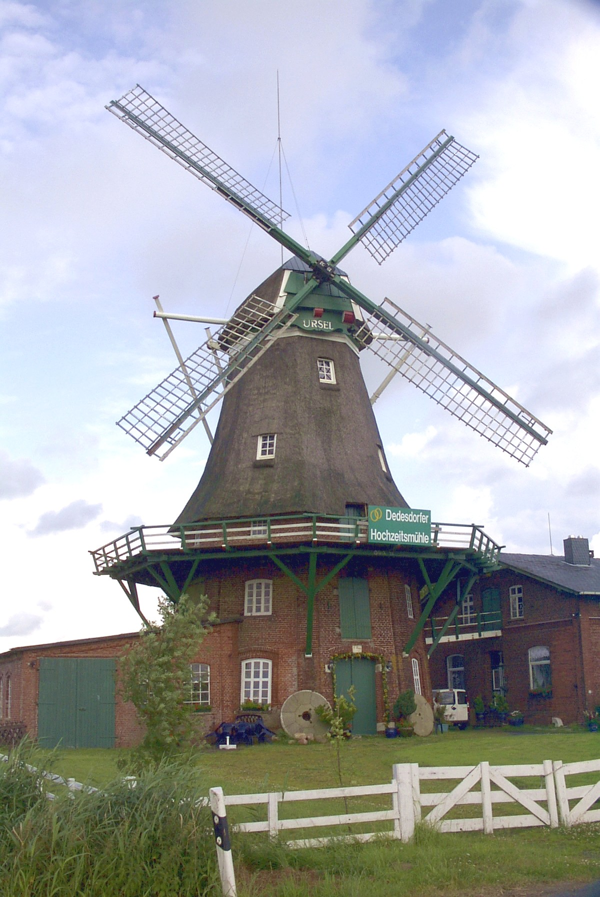 Dedesdorfer Galerieholländerwindmühle "Ursel"